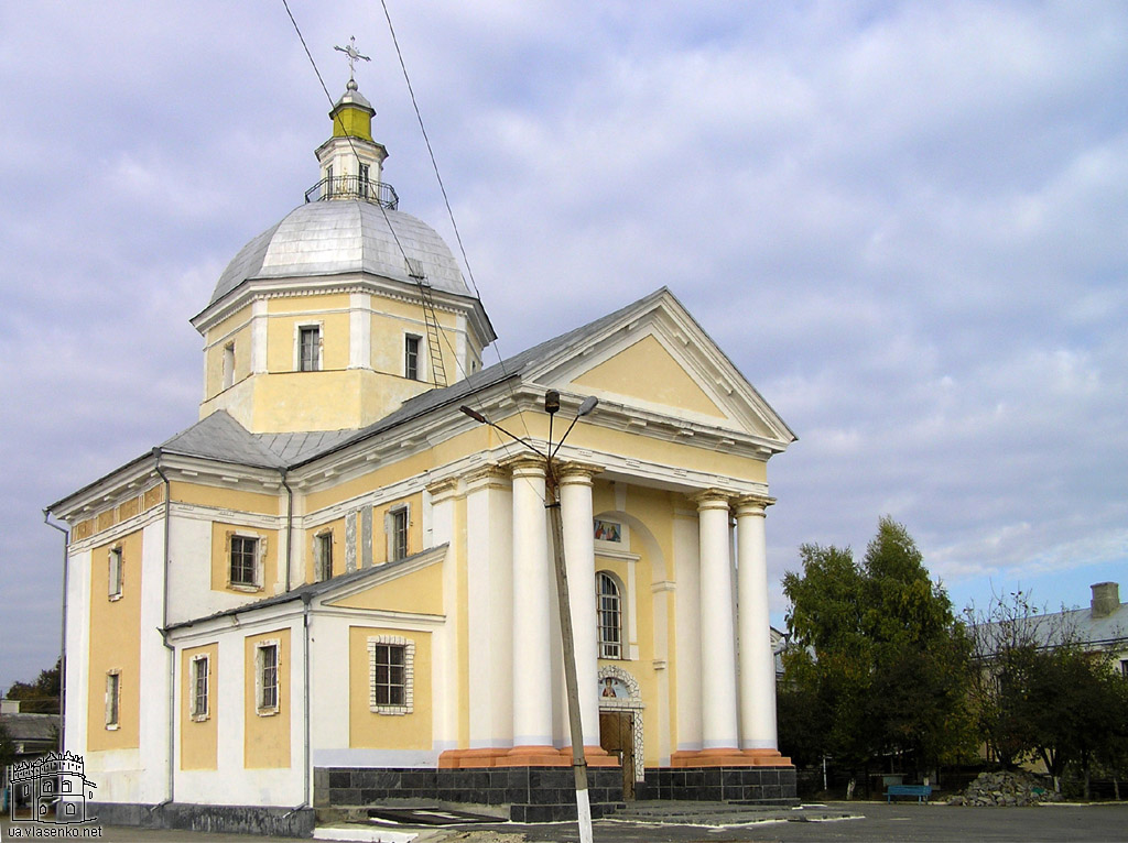 Костел Діви Марії 1781 р.